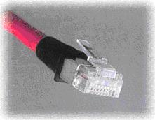 IMG14